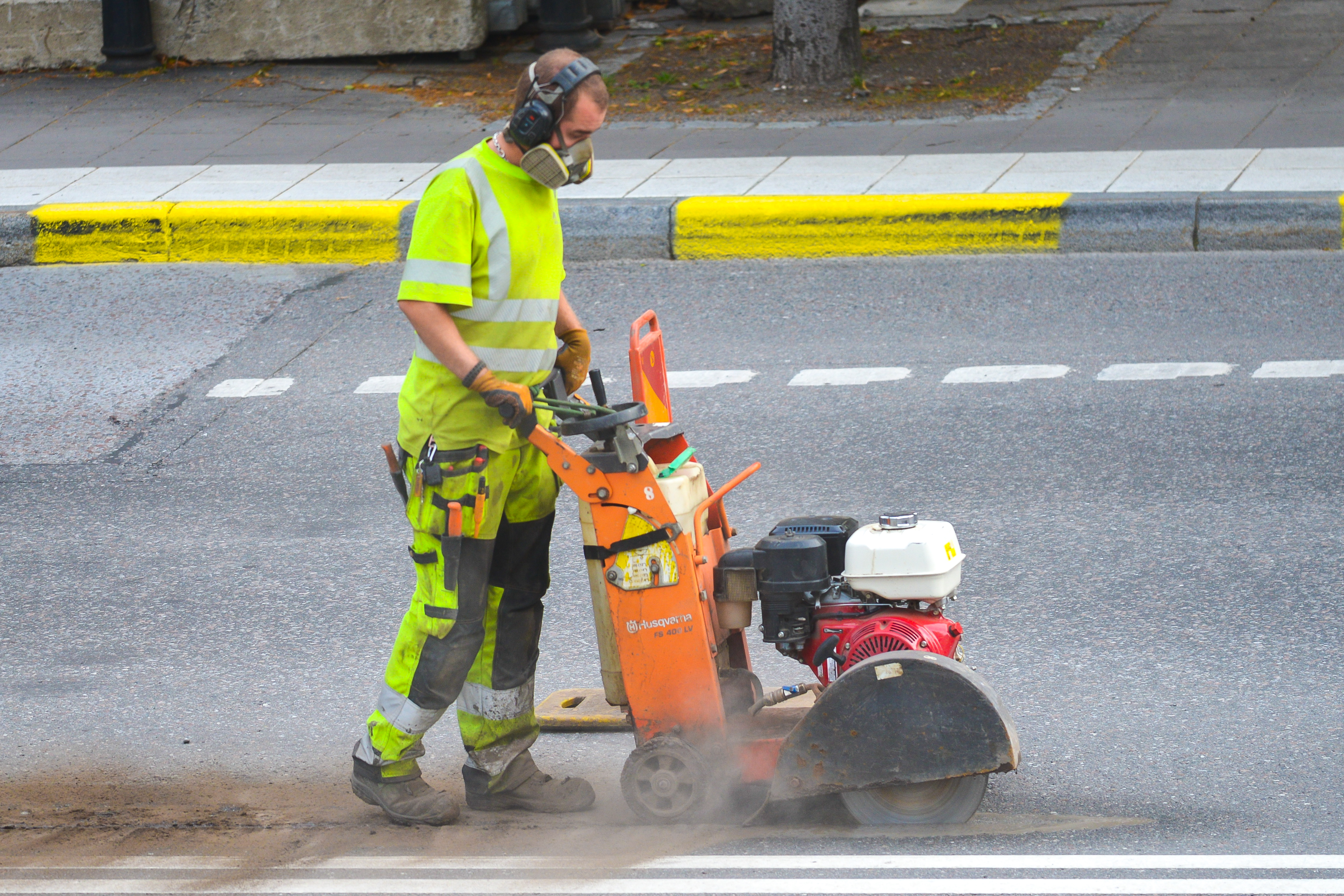 Fjärrvärmearbete för Stockholm Exergi på Kungsholmsgatan på Kungsholmen i Stockholm i juli 2020.